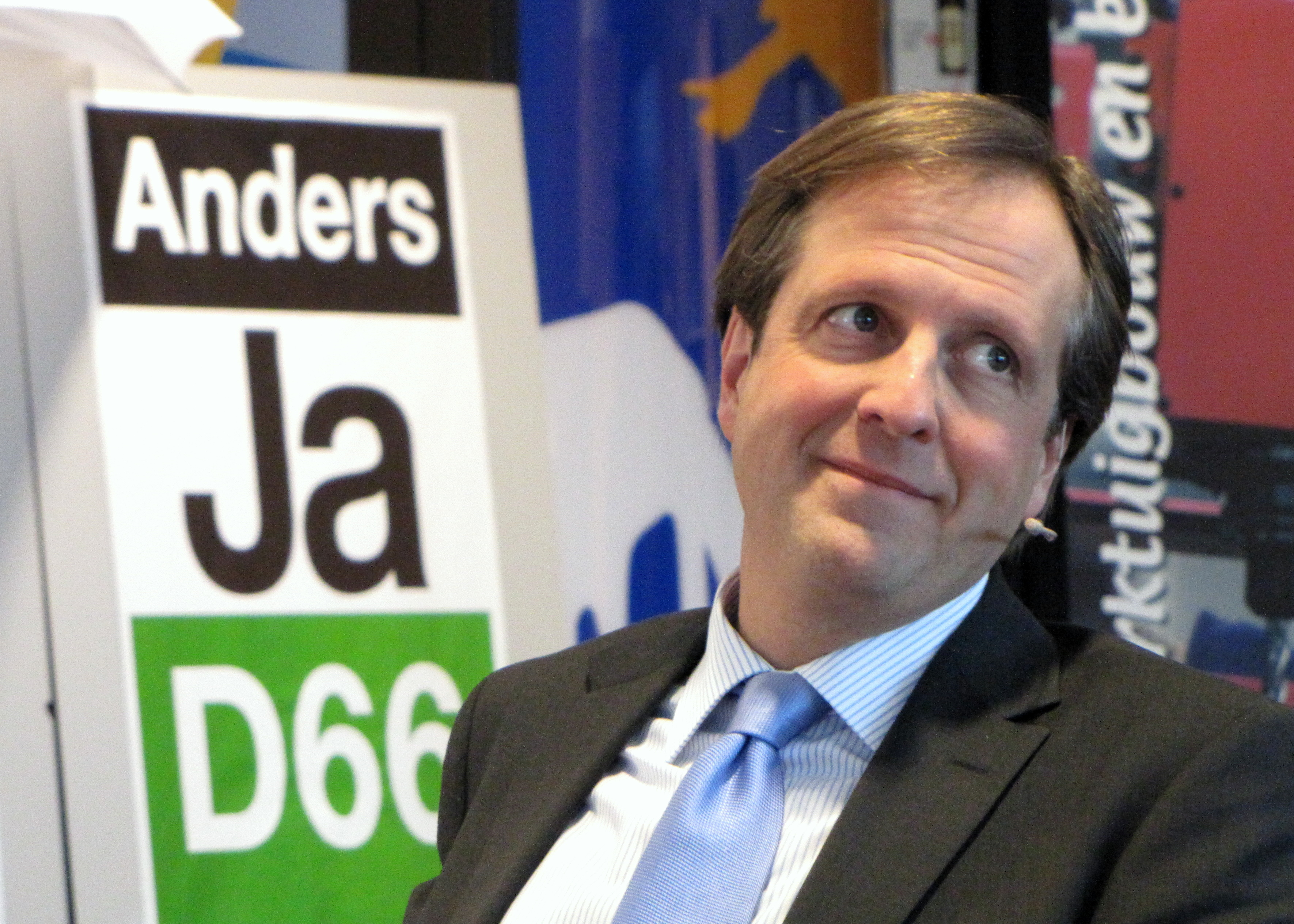 Bezoek aan Anton-Tijdink-school Terborg (Oude IJsselstreek). Alexander Pechtold (D66).